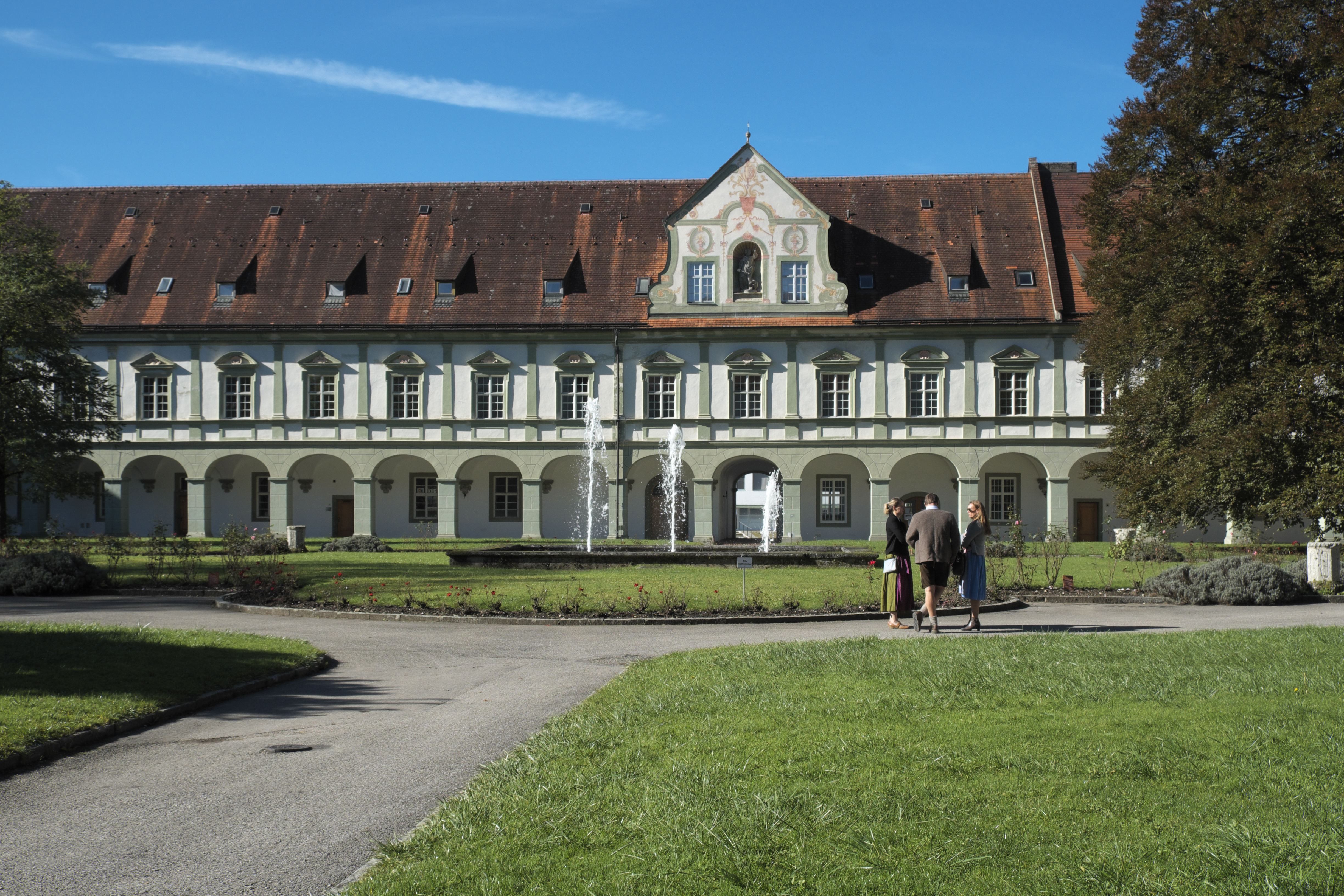 Innenhof und Konventsgebäude des ehemaligen Benediktinerklosters in Benediktbeuern im Landkreis Bad Tölz-Wolfratshausen (Bayern/Deutschland)